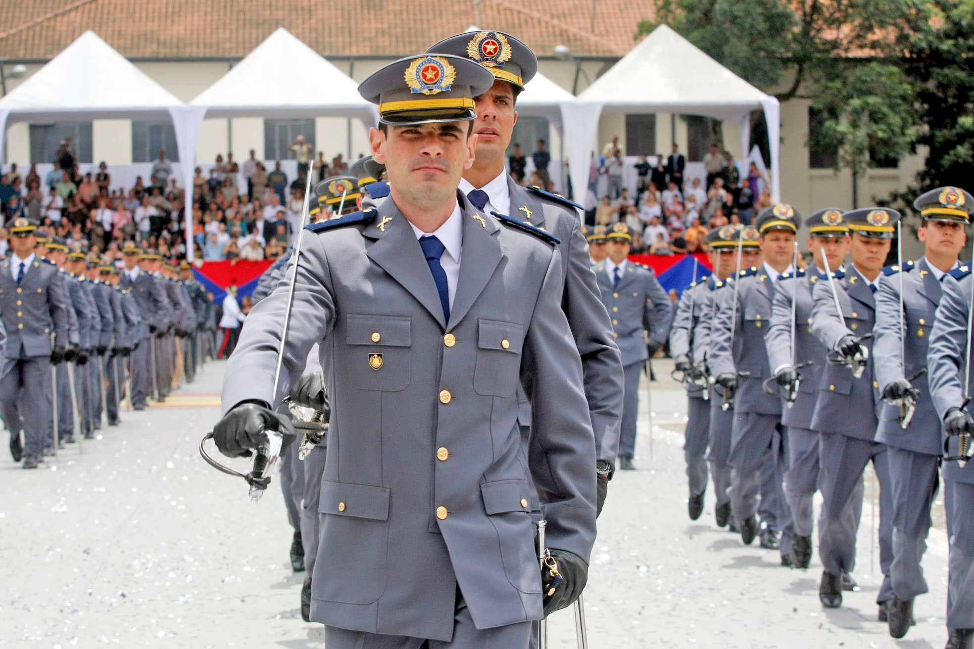 Formação da Policia Militar de São Paulo